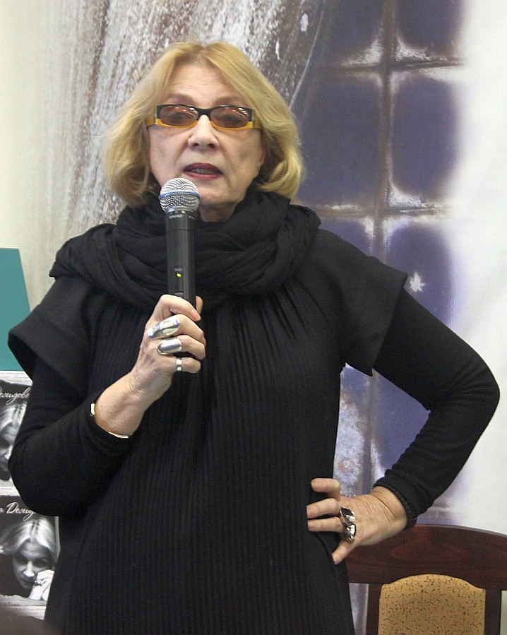 Russian actress Alla Demidova